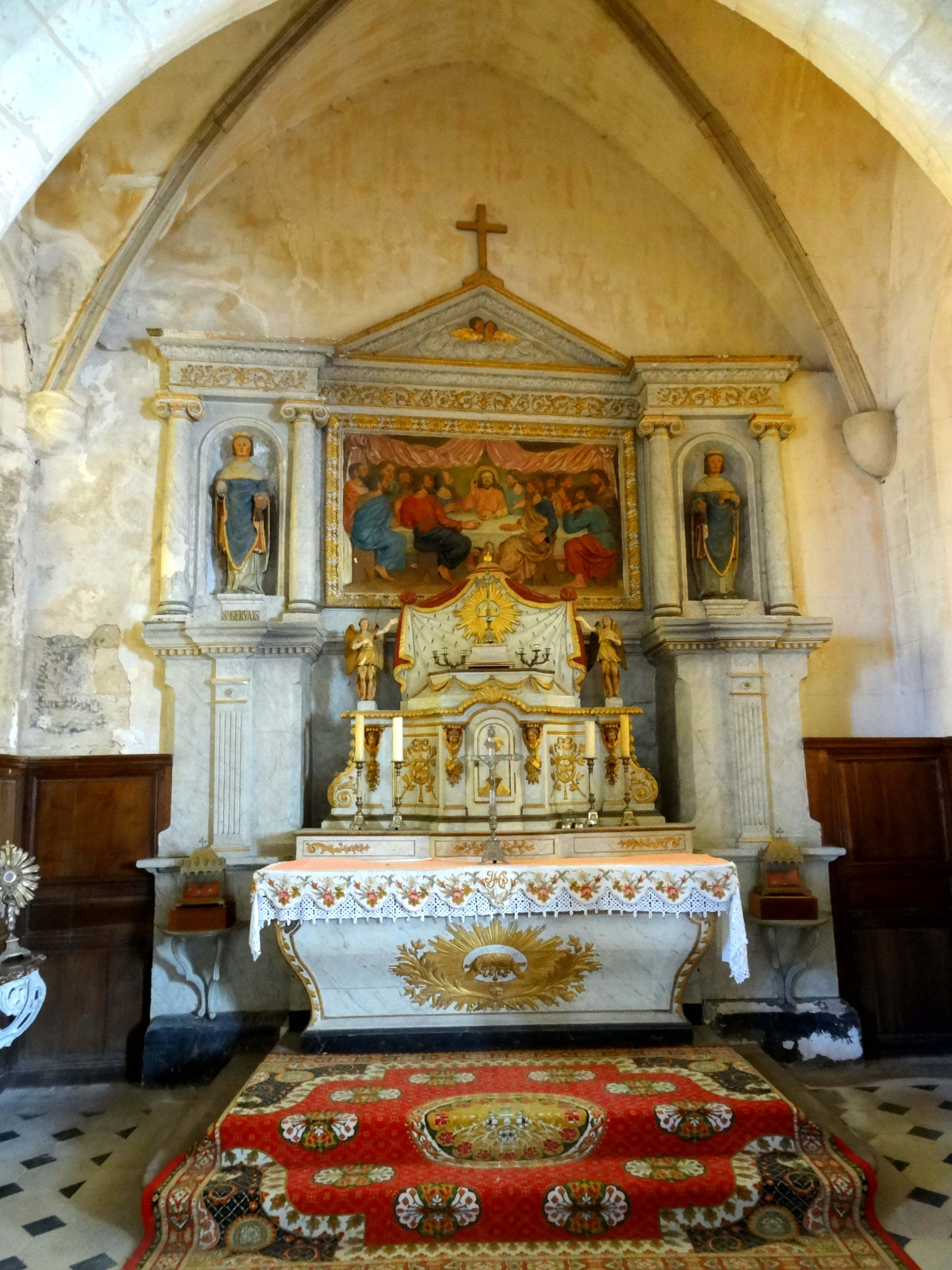 Intérieur de l'église - voir titre.